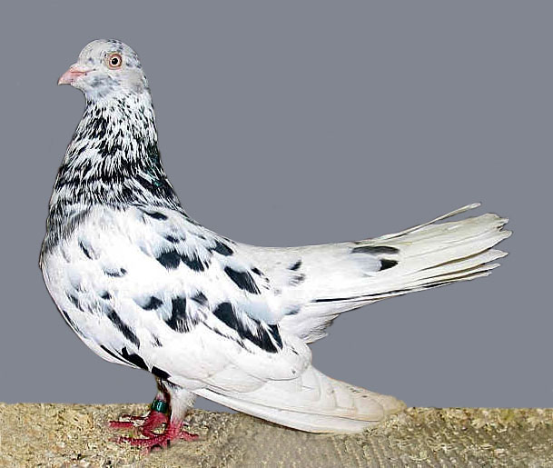 Oriental Roller (Grizzle)